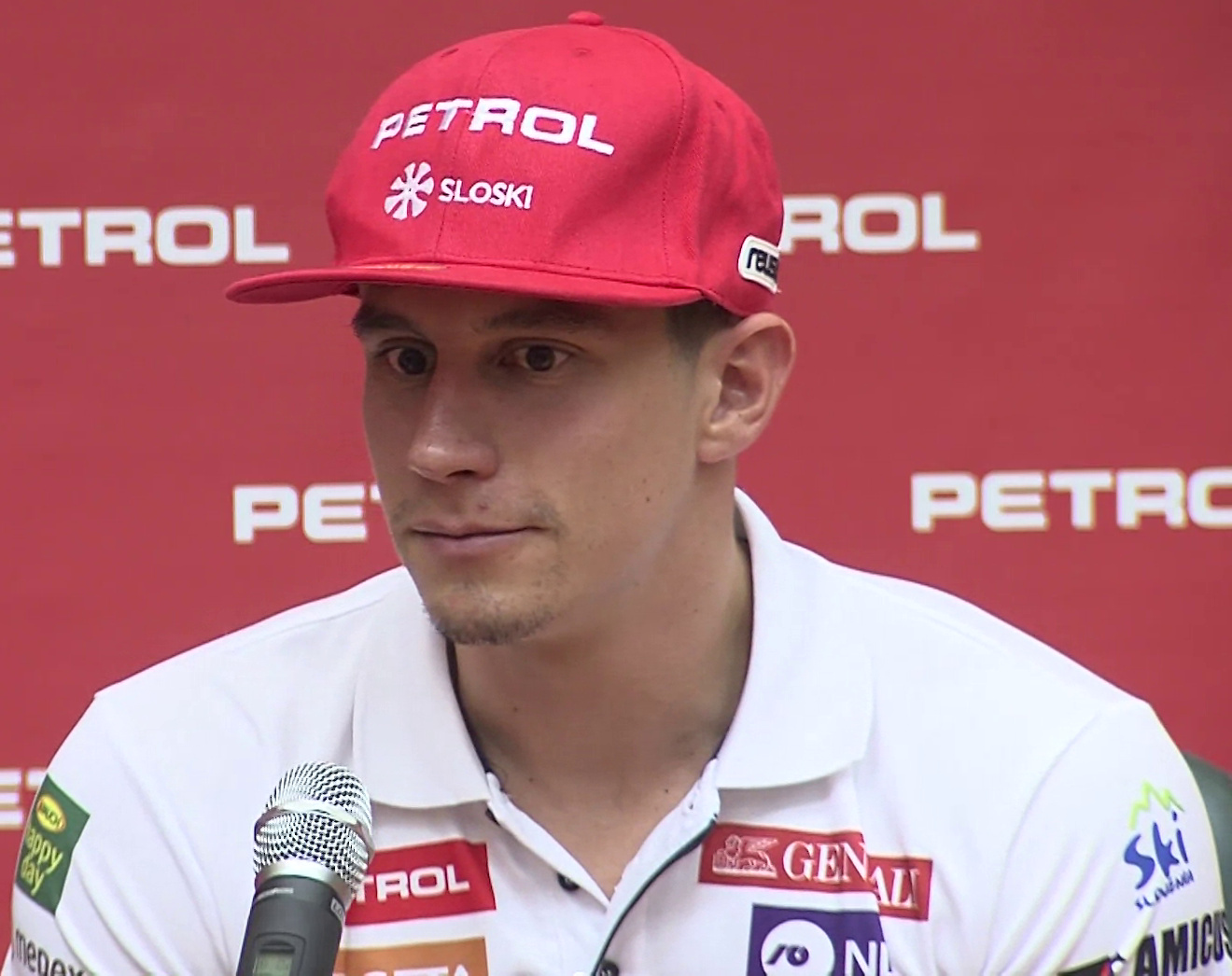 Žan Kranjec